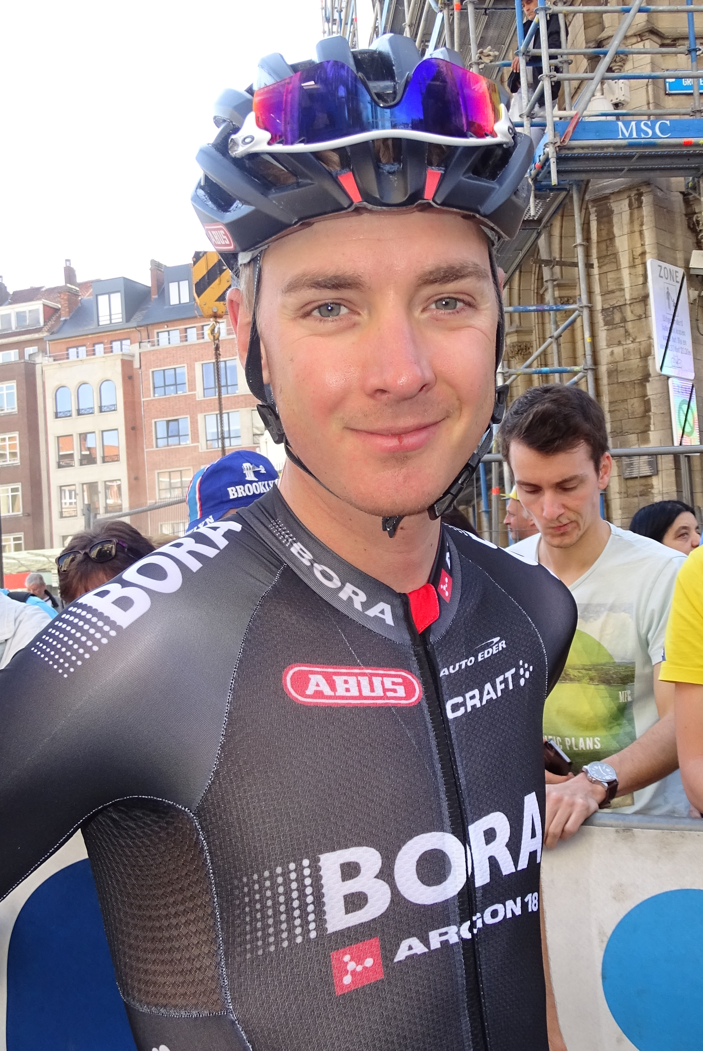 Reportage réalisé le mercredi 15 avril à l'occasion du départ de la Flèche brabançonne 2015 à Louvain, Belgique.